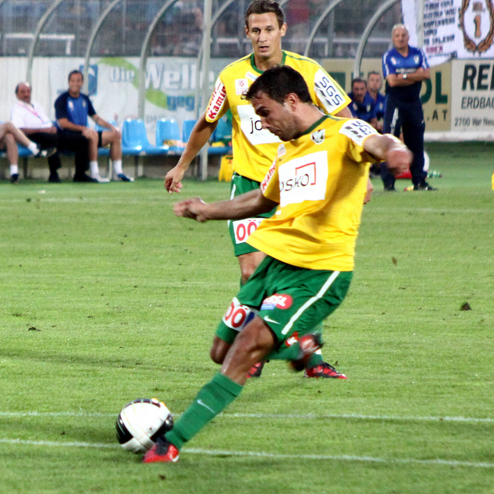 Guillem Martí (SV Ried beim Torschuss, Florian Mader im Hintergrund beobachtet die Szene